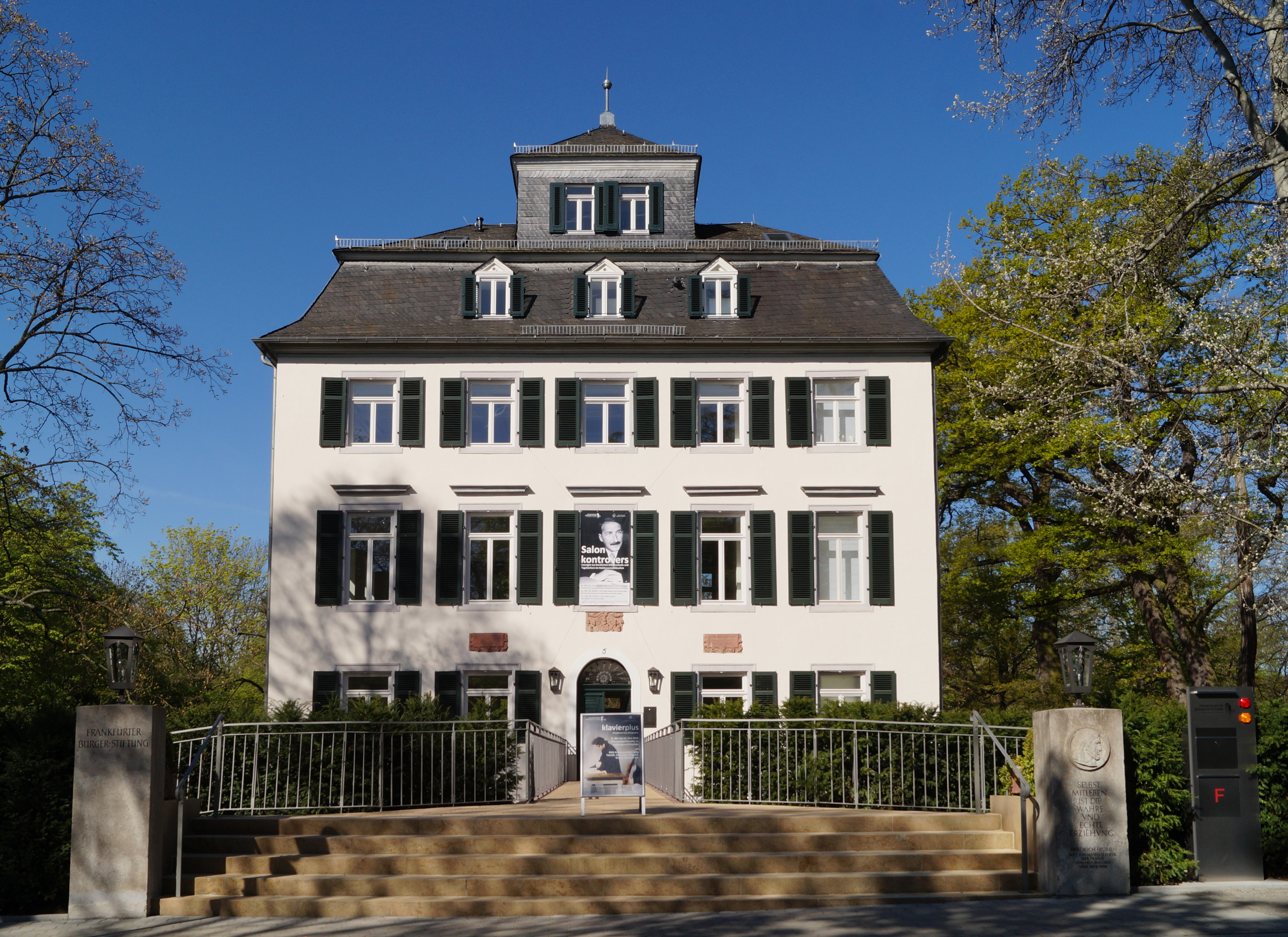 Holzhausenschlösschen in Frankfurt a.M., Ansicht von Osten.